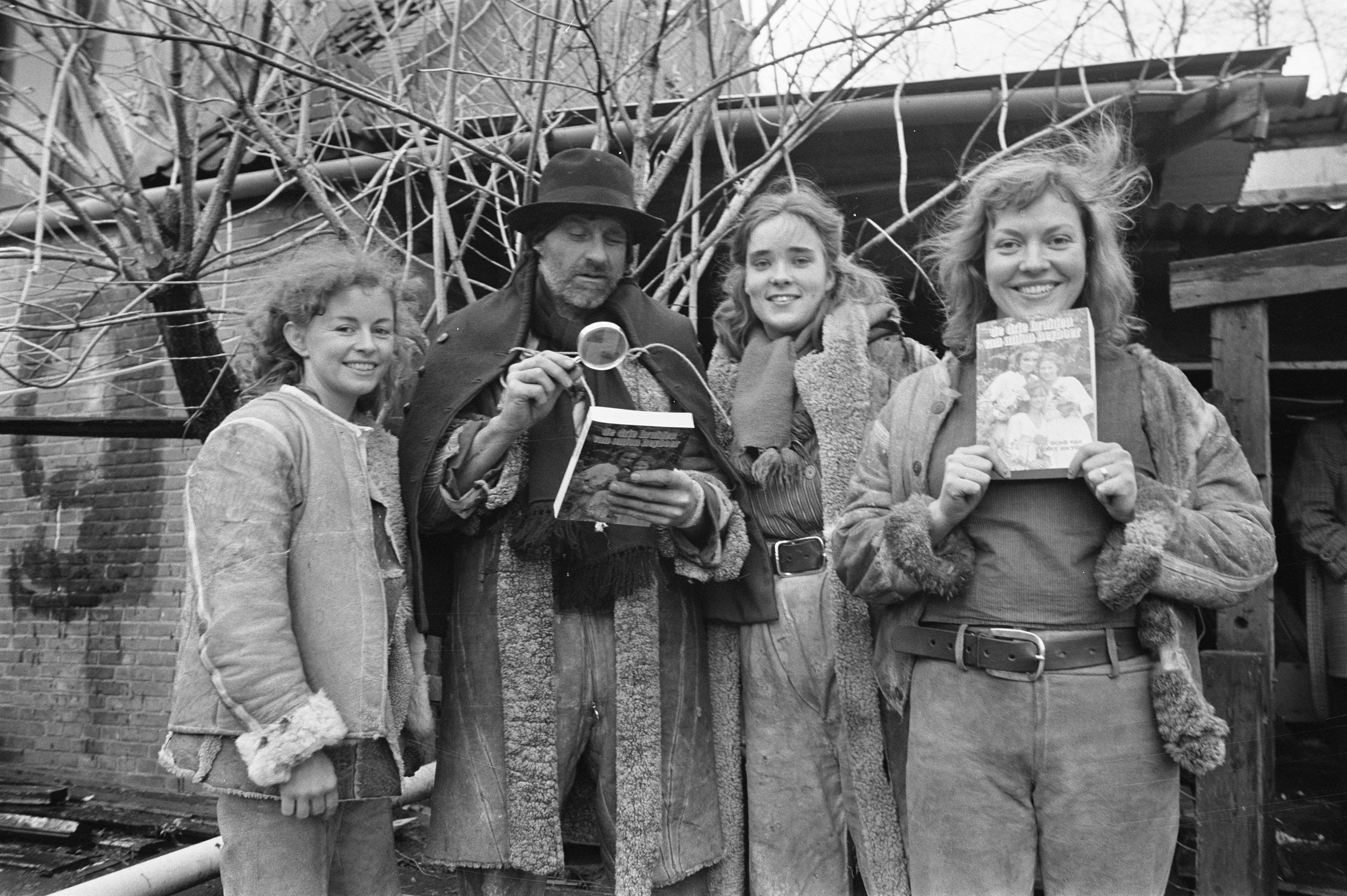 Collectie / Archief : Fotocollectie Anefo Reportage / Serie : [ onbekend ] Beschrijving : Kunstenaar Anton Heyboer krijgt in Den Ilp 1e exempla "De drie bruiden van Anton Heyboer" geschreven door Henk van der Meyden ; Heyboer met 3 bruiden v.l.n.r. Datum : 28 november 1974 Trefwoorden : kunstenaars Persoonsnaam : Anton Heyboer, Henk van der Meyden Fotograaf : Croes, Rob C. / Anefo Auteursrechthebbende : Nationaal Archief Materiaalsoort : Negatief (zwart/wit) Nummer archiefinventaris : bekijk toegang 2.24.01.05 Bestanddeelnummer : 927-6143